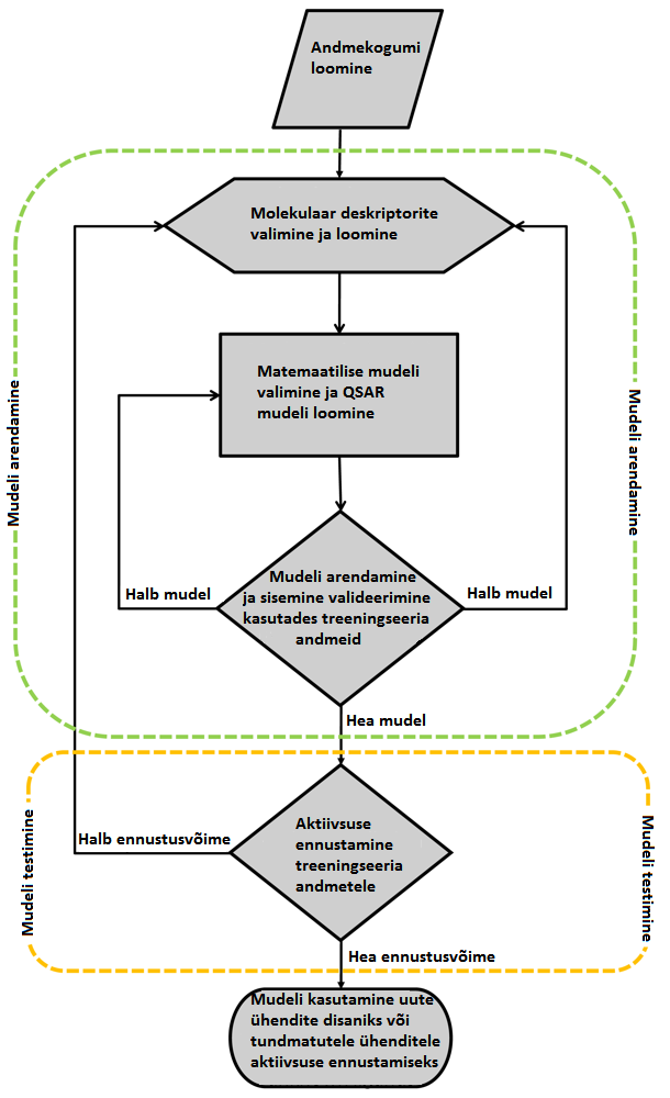 QSARi loomise skeem